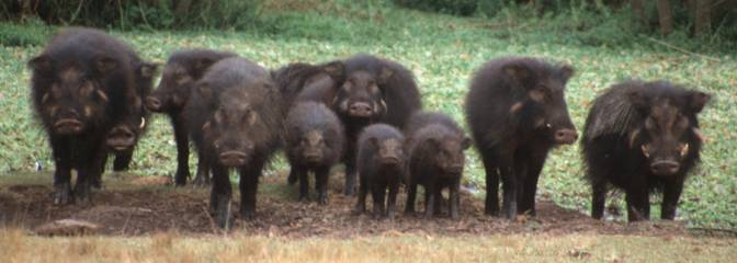 Giant forest hog (Hylochoerus meinertzhageni)